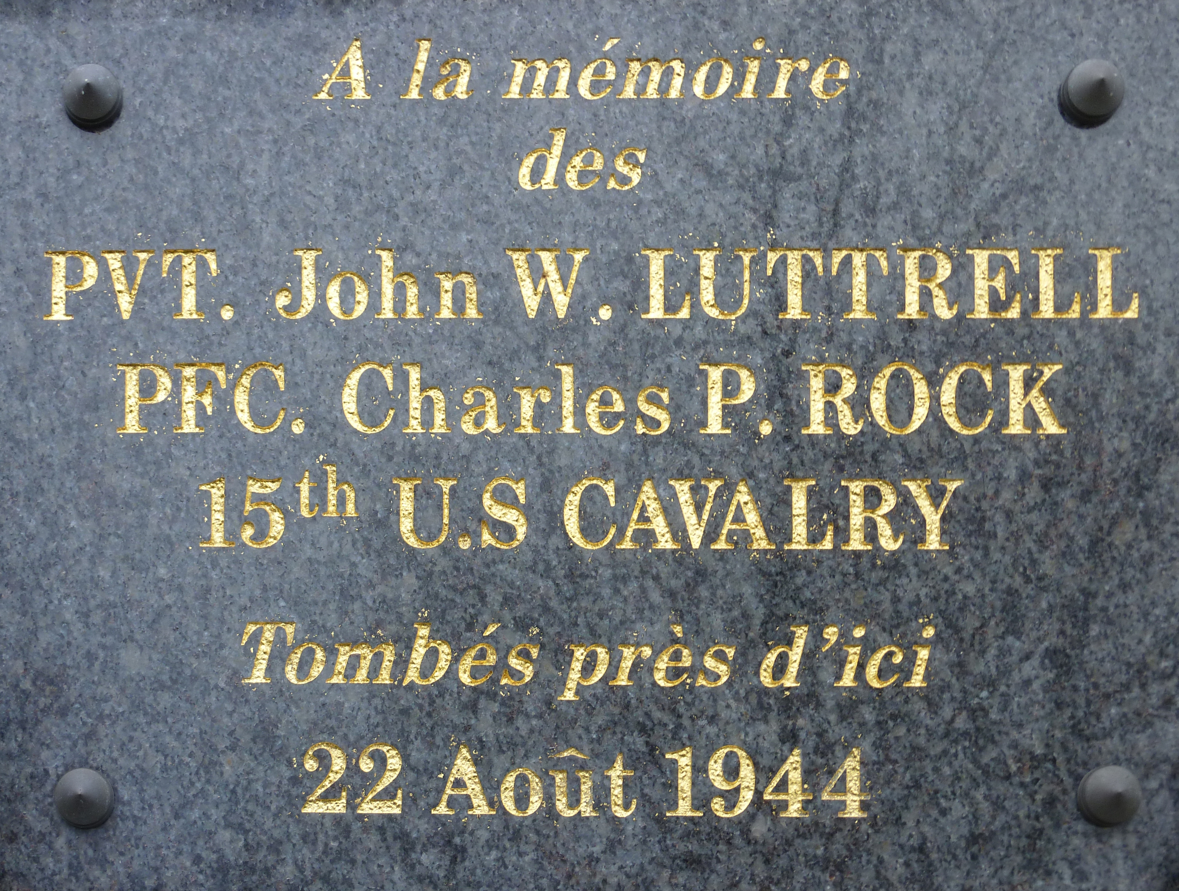 Plougastel-Daoulas : plaque commémorative en l'honneur de soldats américains sur l'un des murs de la chapelle Saint-Claude